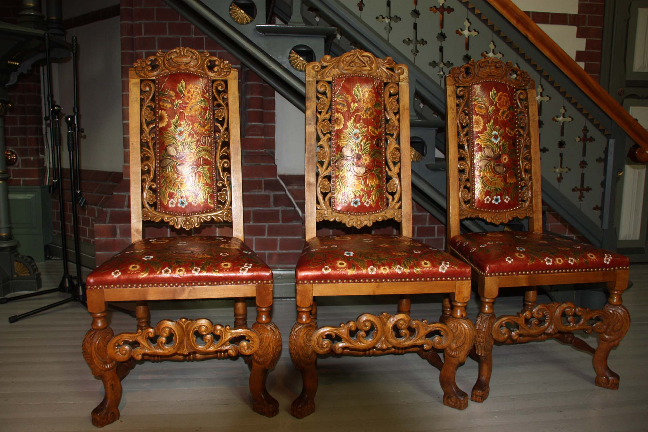 Kirkestoler i Trefoldighetskirken i Arendal